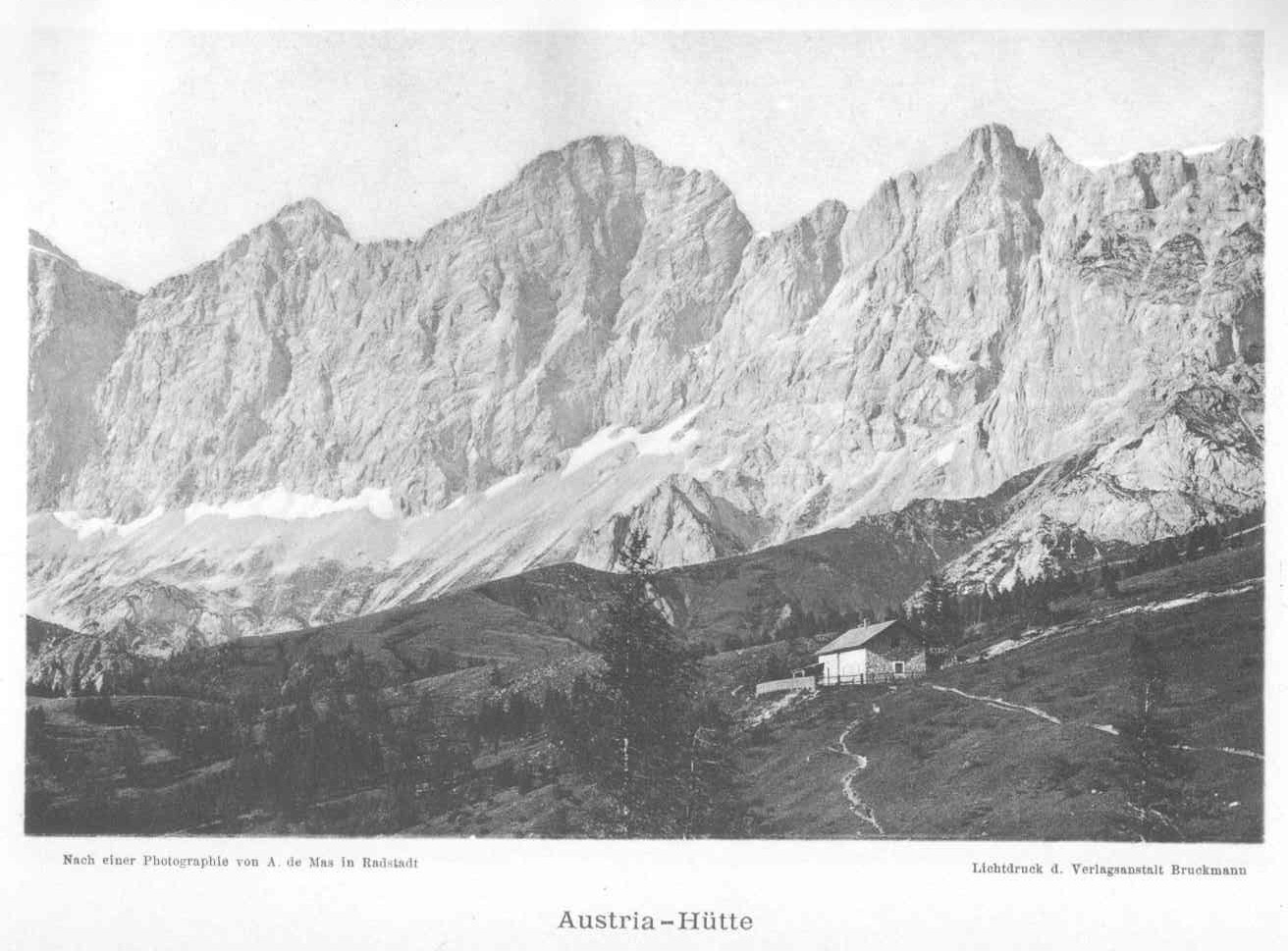 Austriahütte vor den Dachsteinsüdwänden.